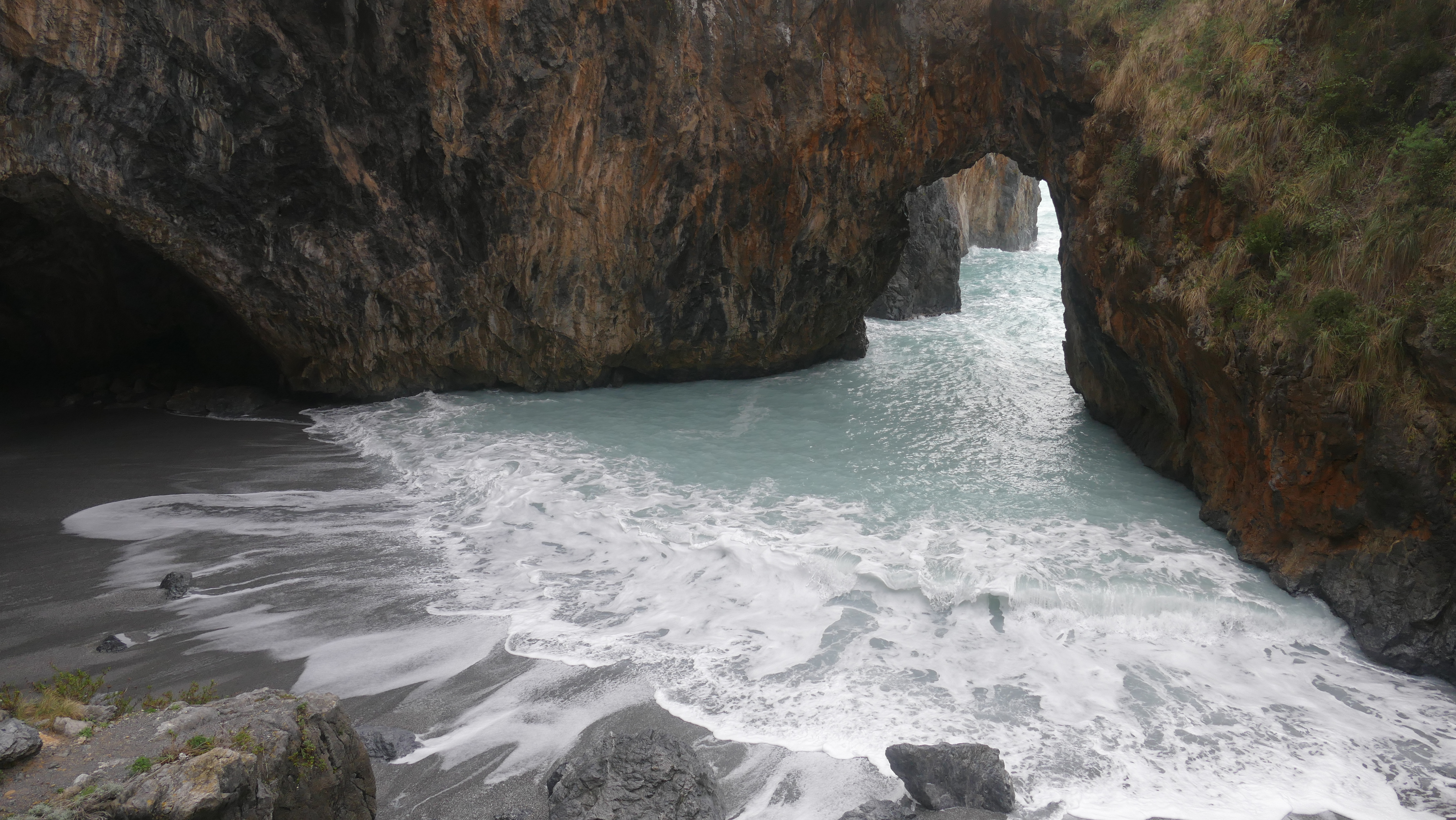 Plaża Arcomagno i formacja skalna